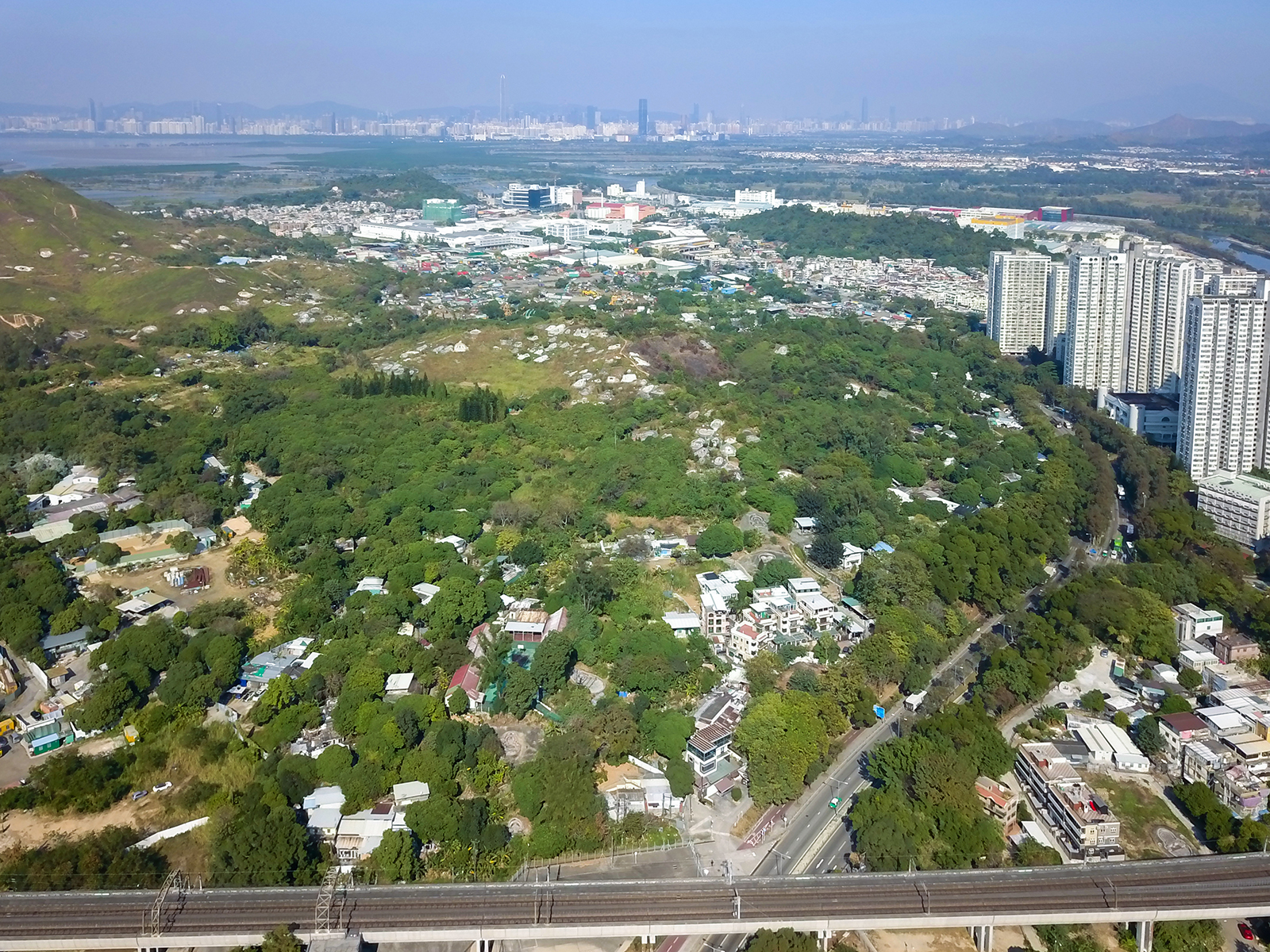 Wang Chau Overview